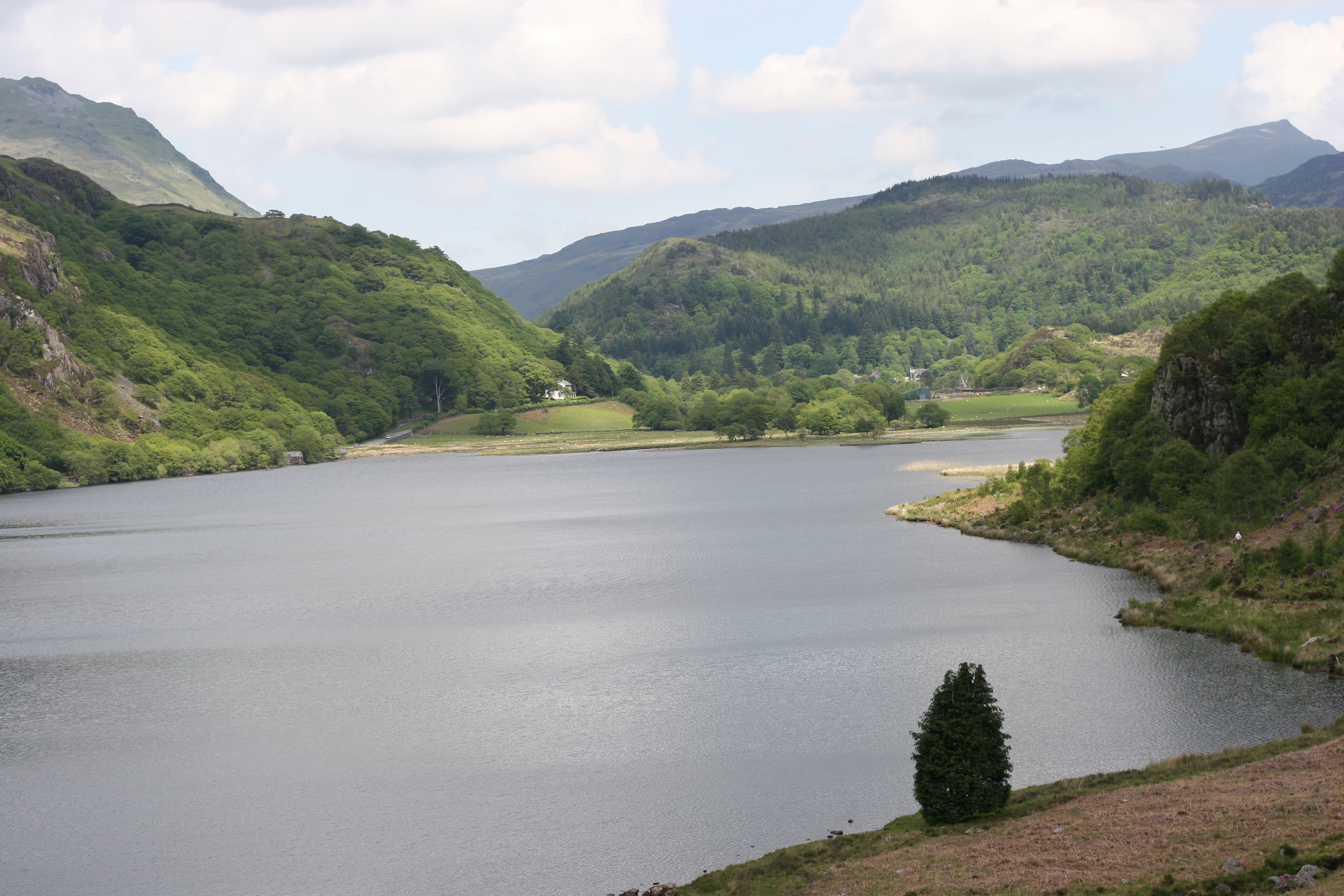 LLyn Dinas, Gwynedd 05/06/2006 Rhion Pritchard : own work